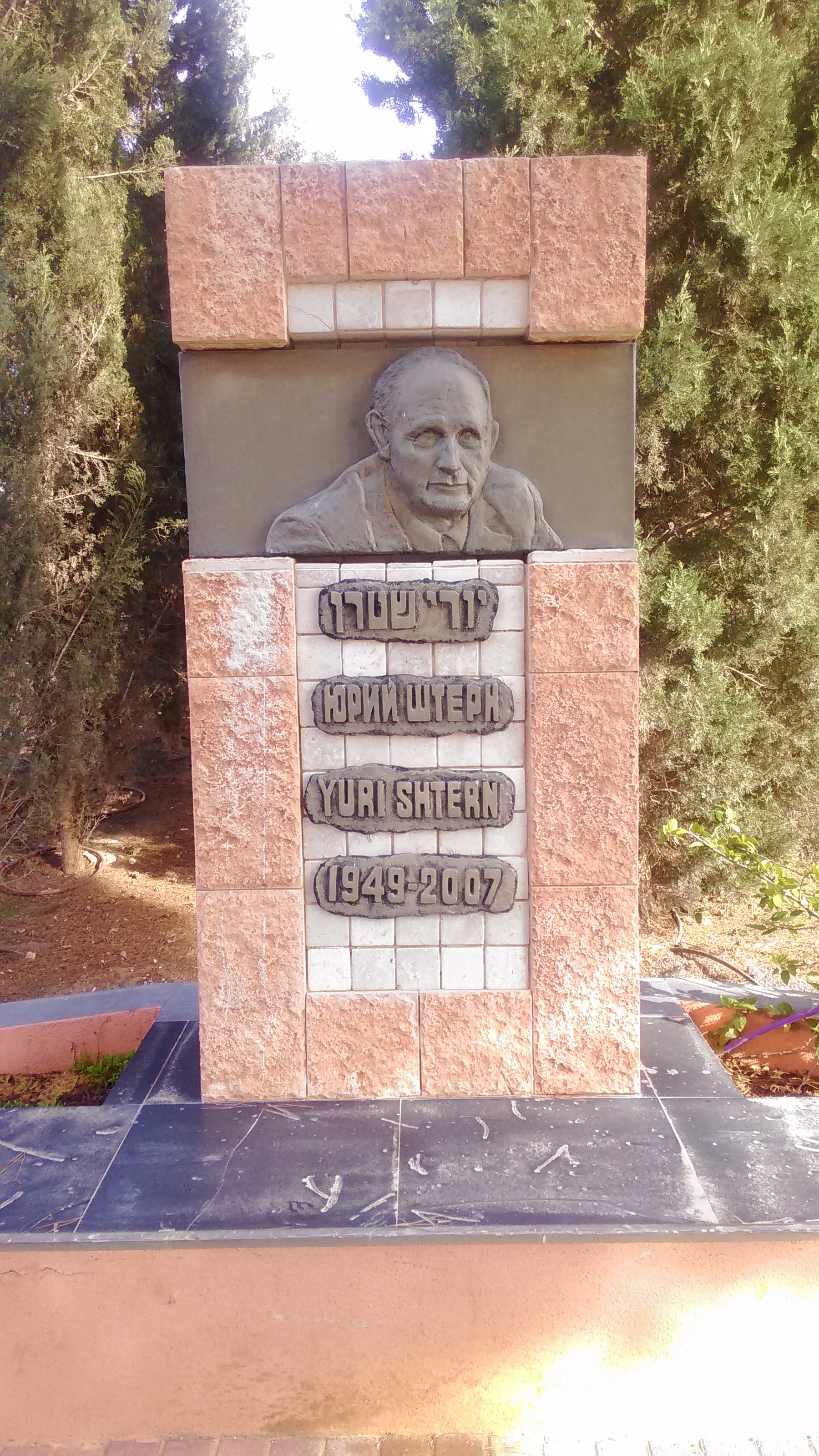 אנדרטה יורי שטרן